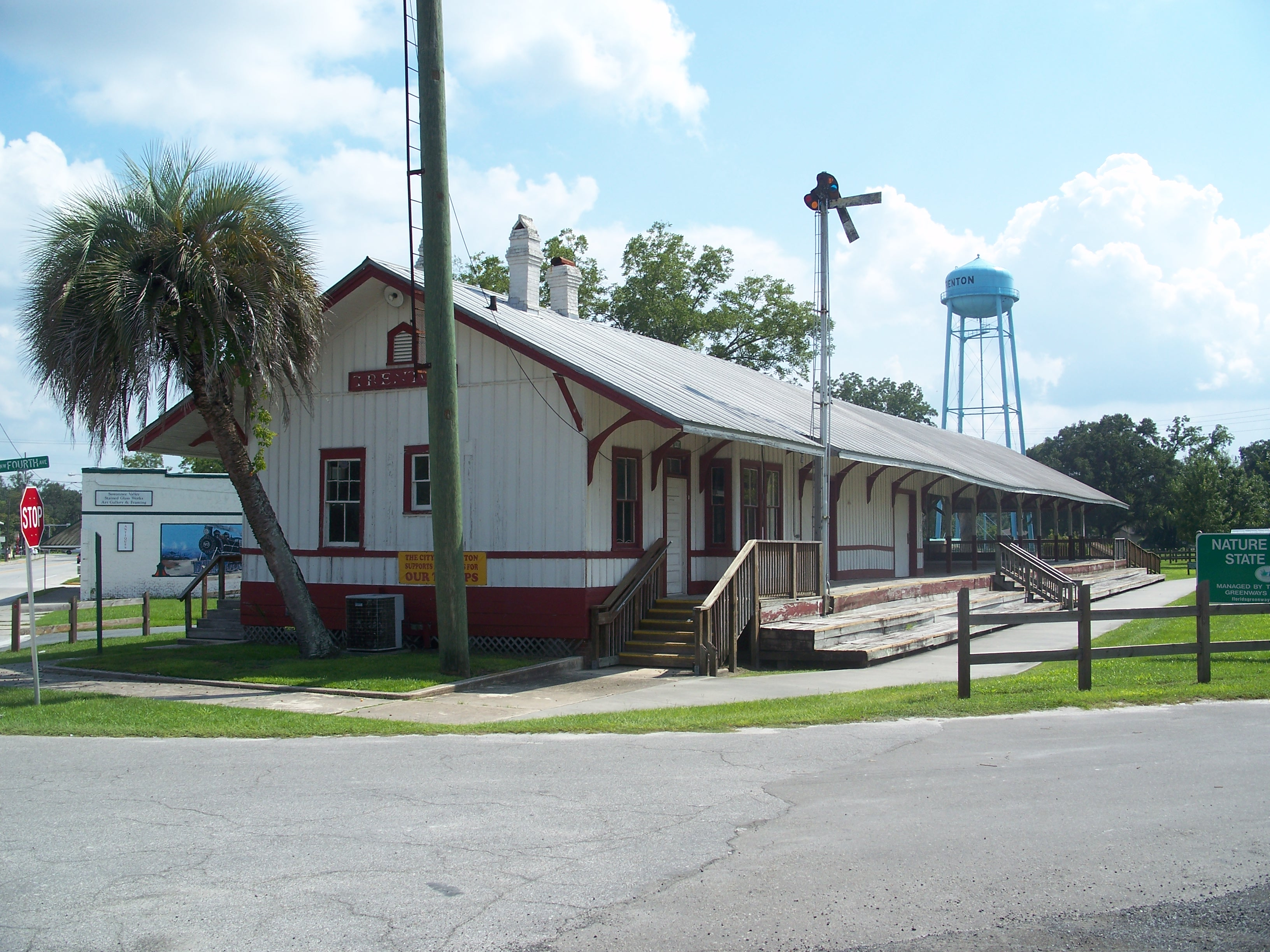 Trenton, Florida: Trenton Depot